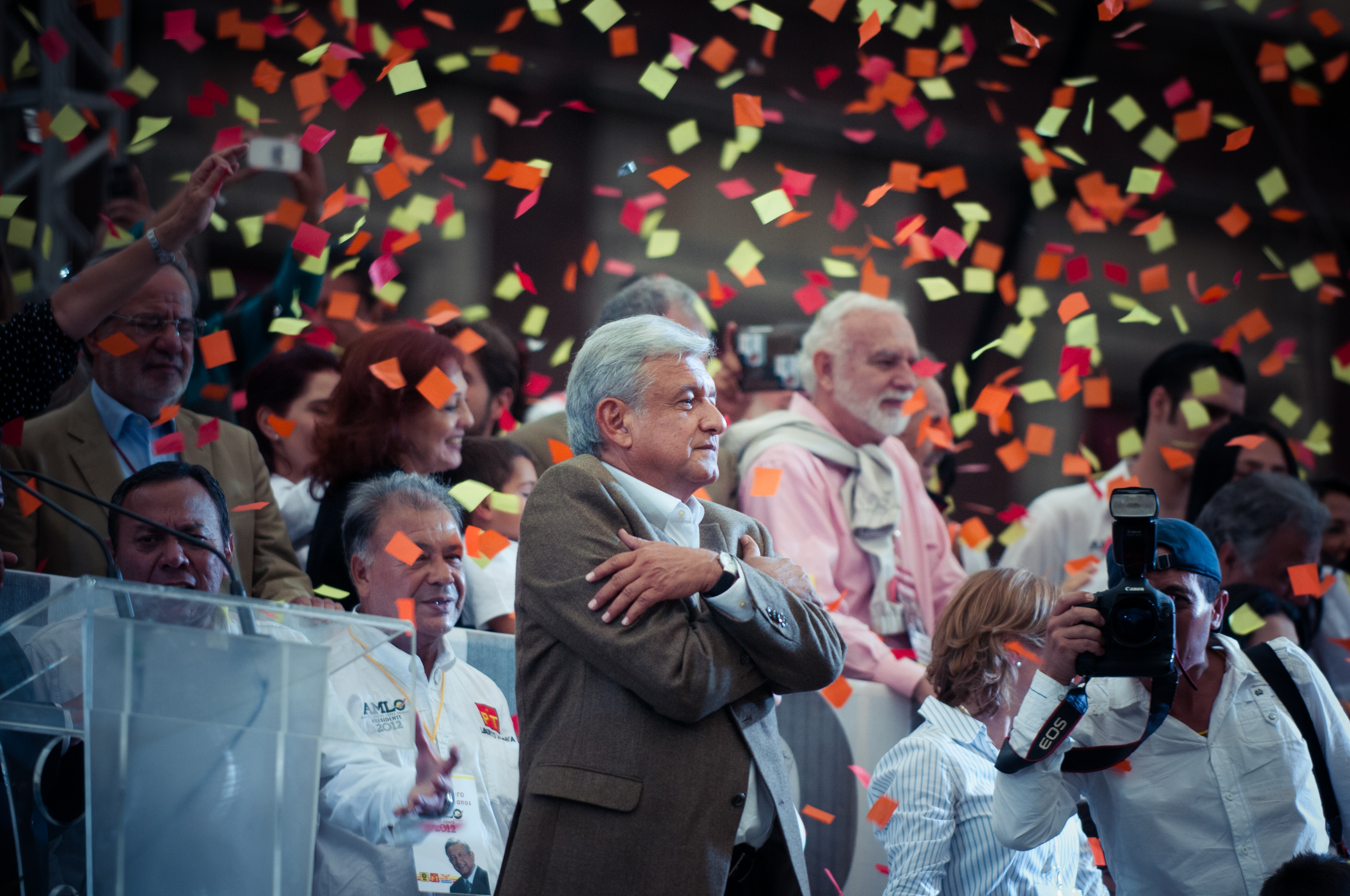 Medios que apoyan al político hablan de que se superó el millón de personas que asistieron al acto de Cierre de Campaña de AMLO, quien estuvo acompañado de su familia, su gabinete y Mancera, sin embargo, a pesar de haber contratado servicio de alimentos para comunidades marginadas, no se tiene clara la cantidad de personas que asistieron.